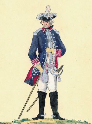 Generał feldzeugmeister (generał artylerii koronnej)